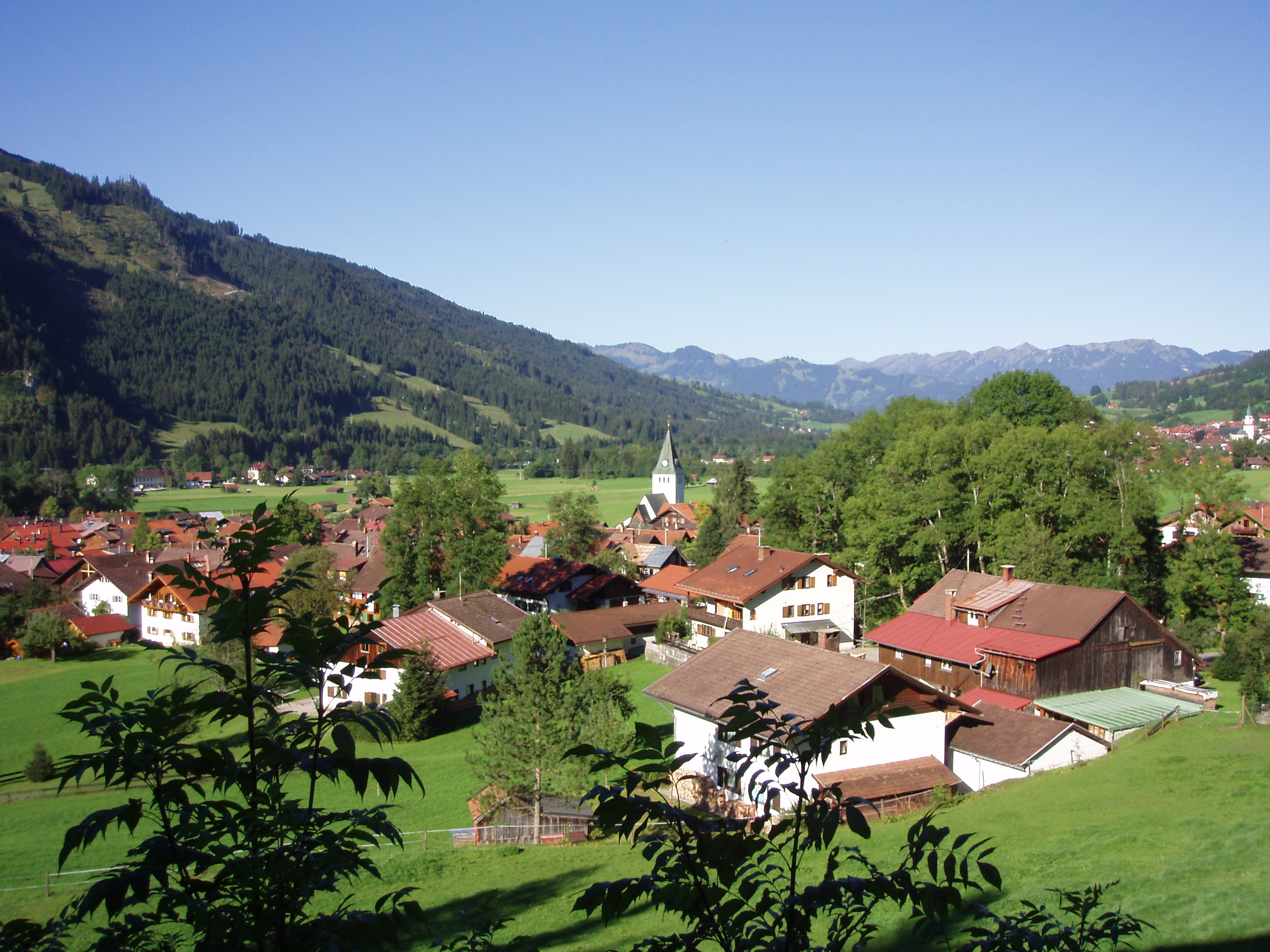 Bad Hindelang; im Vordergrund der Ortsteil Bad Oberdorf